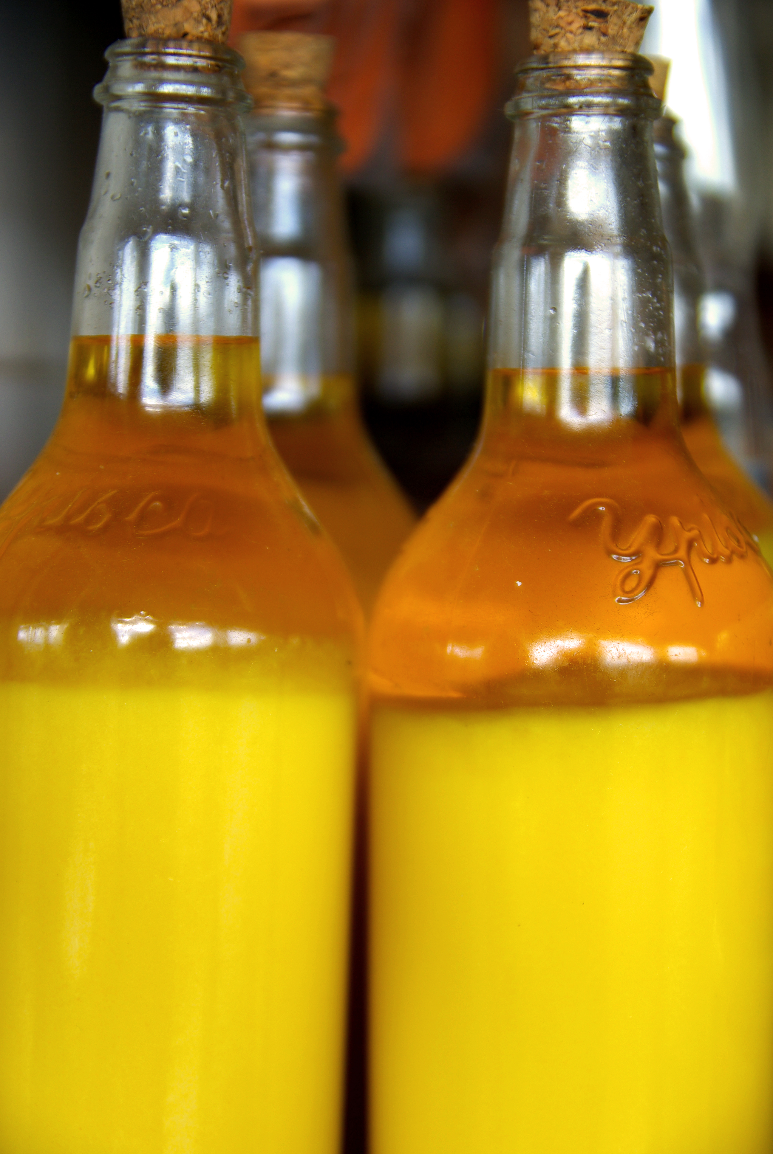 Manteiga de garrafa, município de Tianguá (Ceará)